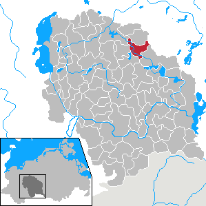 Borkow in Mecklenburg-Vorpommern - District Parchim